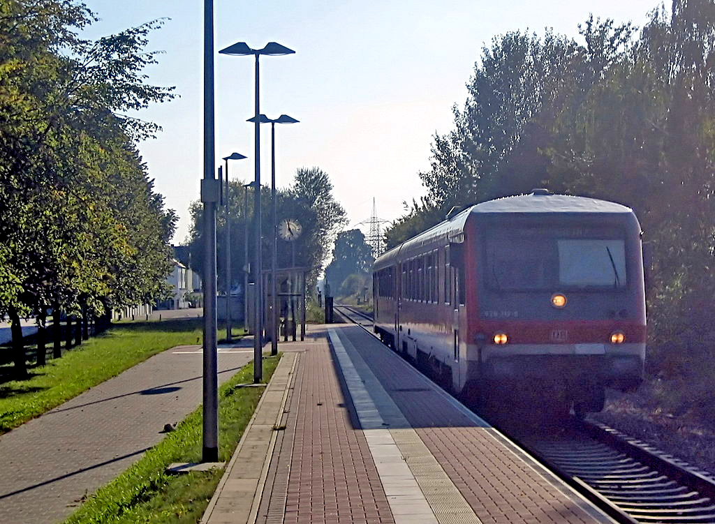 thumb|Original Bearbeitete Version von Image:Maximiliansauimrüsten.JPG durch jha Original-Beschreibung: (Uploaded by Benutzer:AF666) Beschreibung, Quelle und Lizenz Haltepunkt "Maximiliansau Im Rüsten", selbst fotografiert Änderungen: Rauschen reduziert, Tonwertkorrektur Uploaded with Reworkhelper